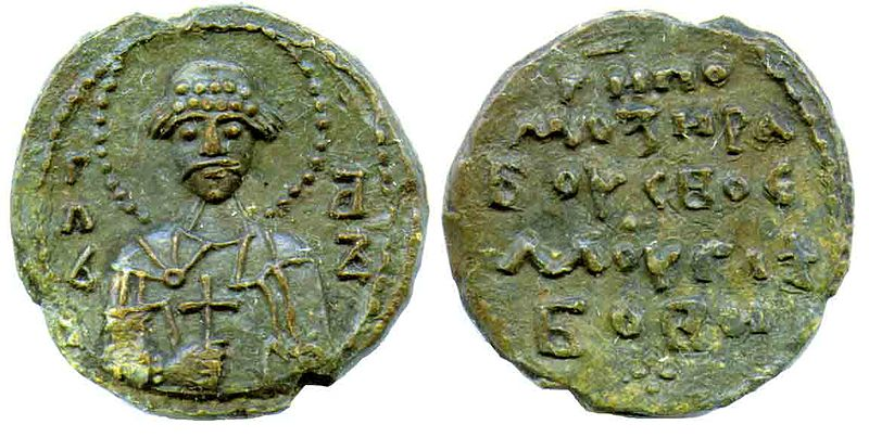 Скан пячаткі Глеба Усяславіча, князя менскага.